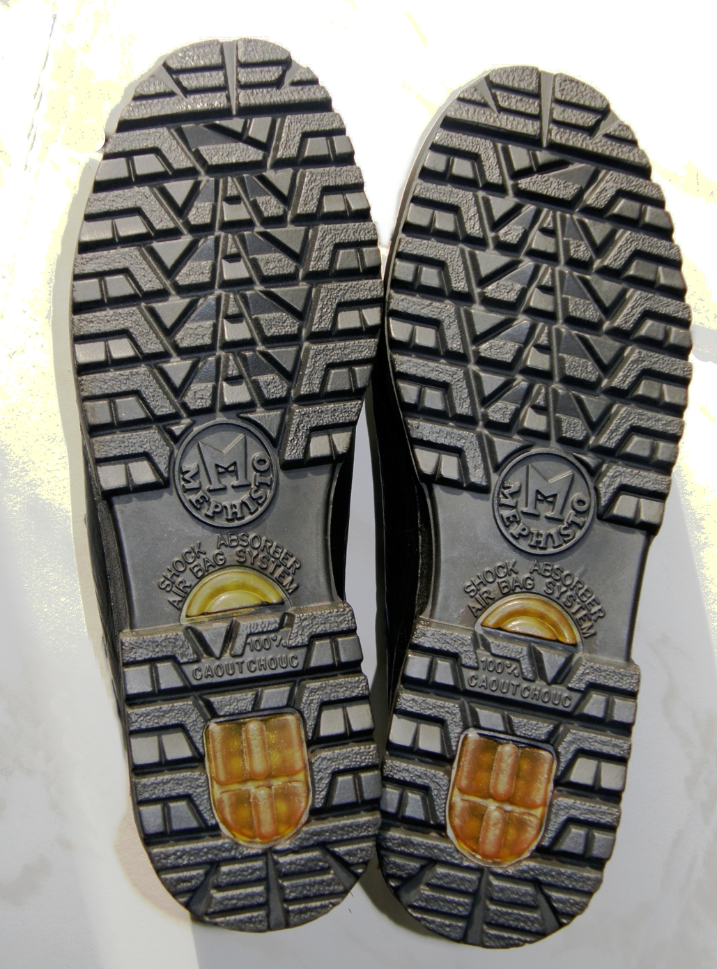 Schuhsohle mit neuem Profil